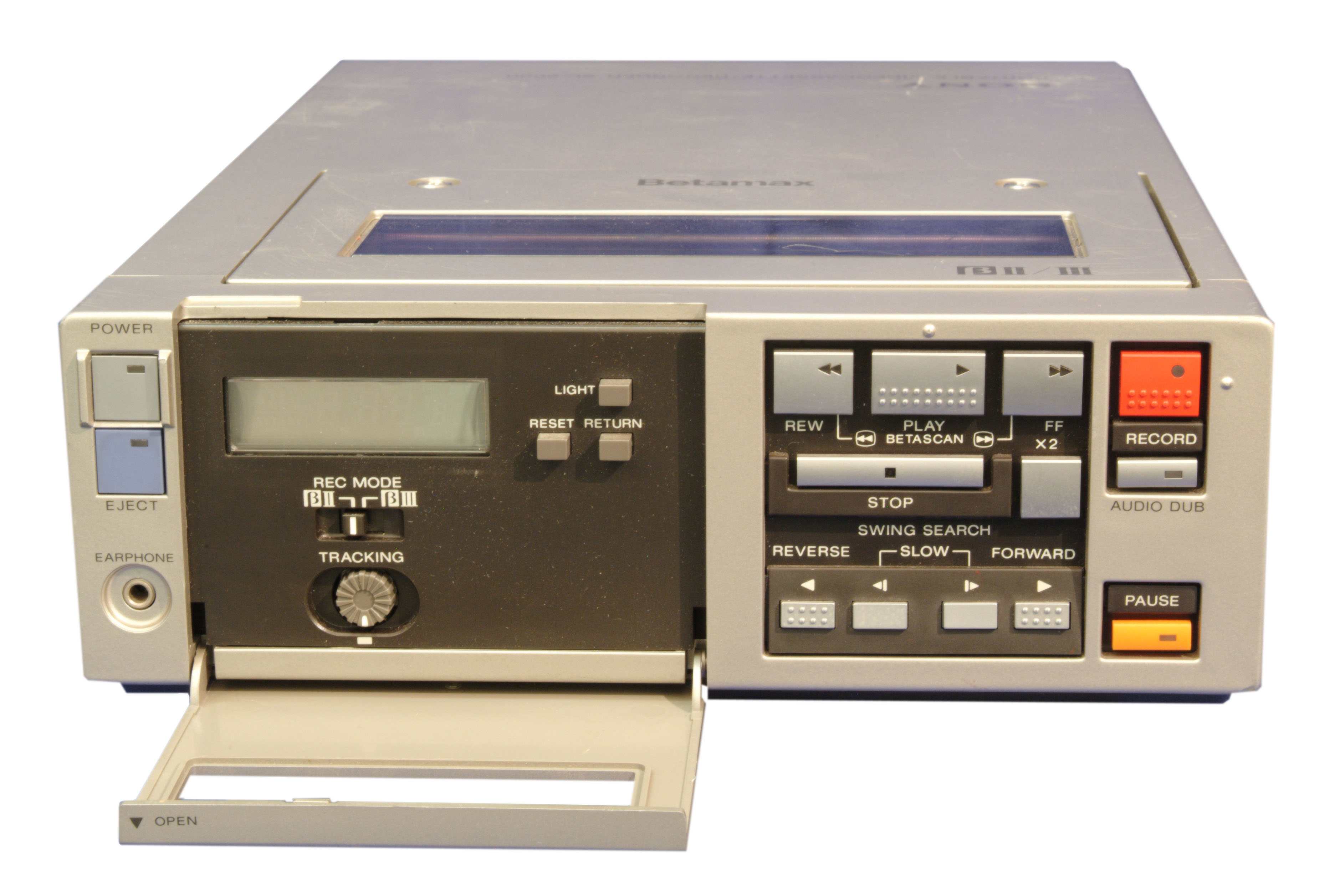 SL-2000 NTSC model. Tragbare Betamax-Maschine der Firma SONY